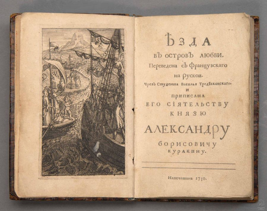 Титульный лист и фронтиспис "Езды в остров Любви" - перевода В. Тредиаковского